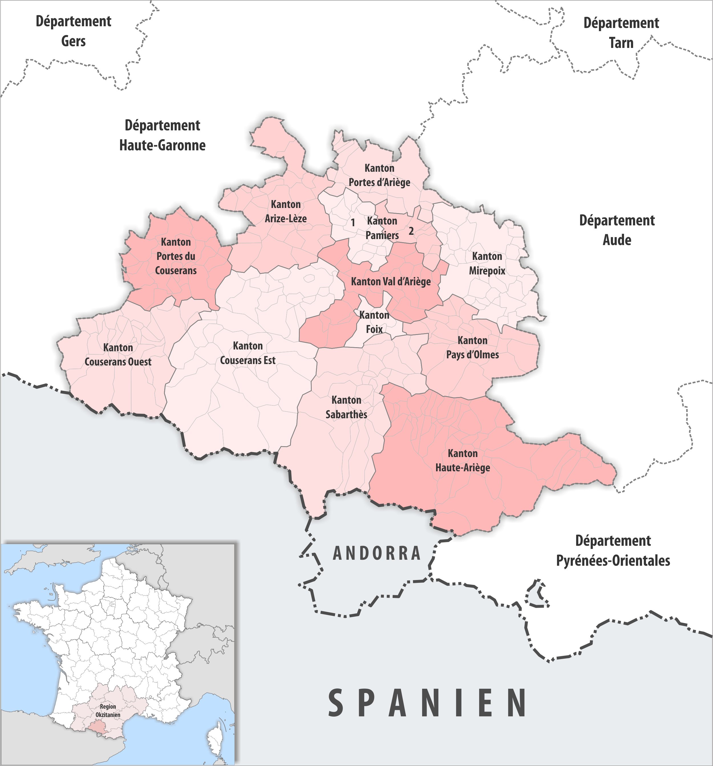 Gemeinden und Kantone im Departement Ariège